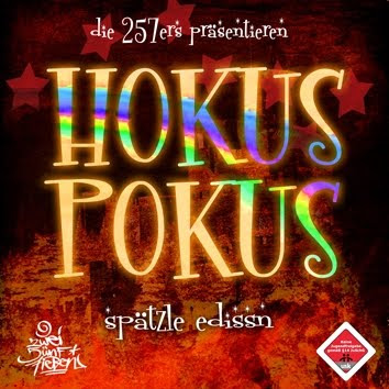 Cover des Albums „Hokus Pokus (Spätzle Edissn)“